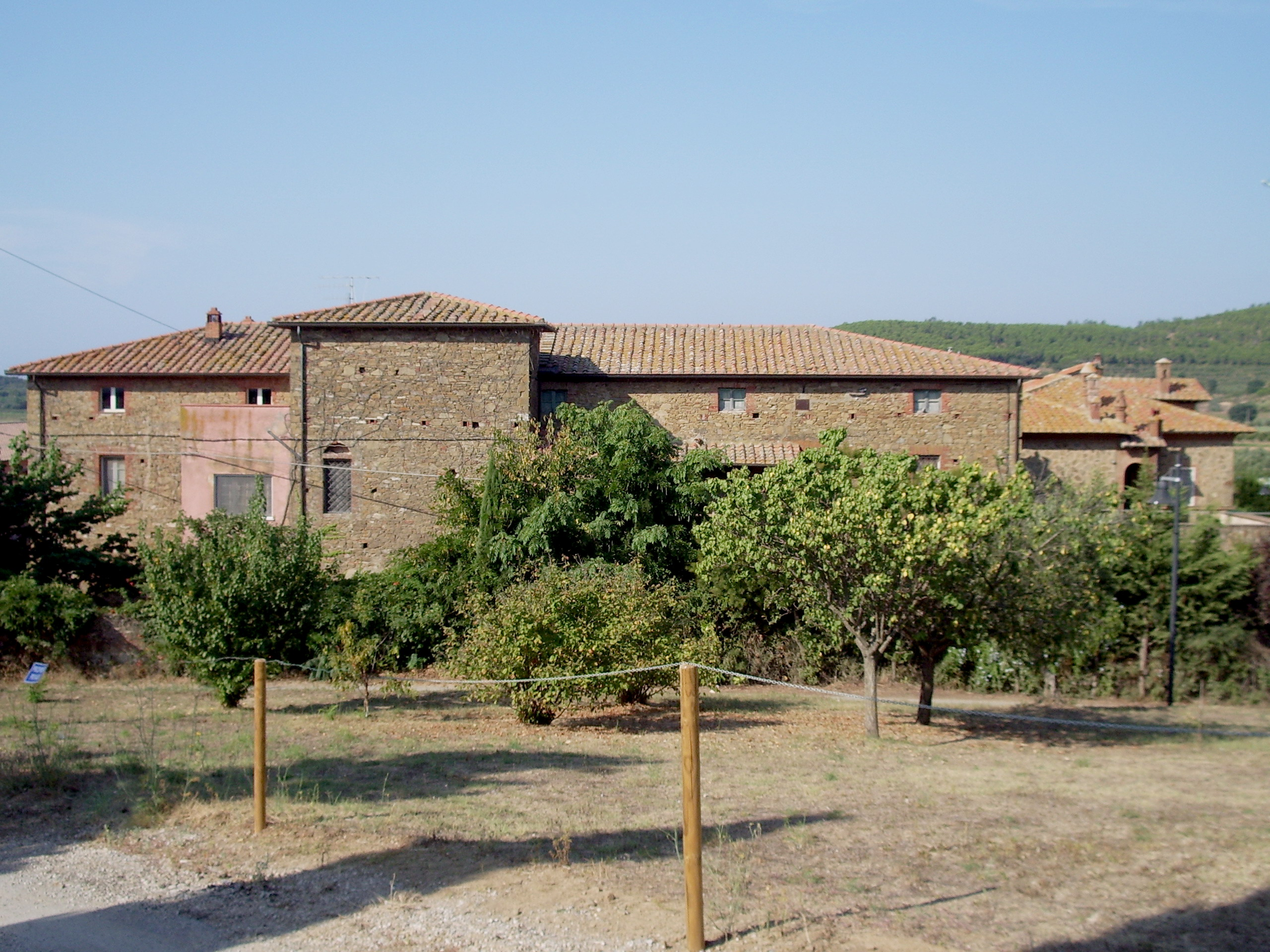 La Fattoria di Pian di Rocca presso Castiglione della Pescaia